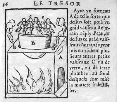 Distillation au bain-marie d'après "tresor des remedes secretz" de Conrad Gesner